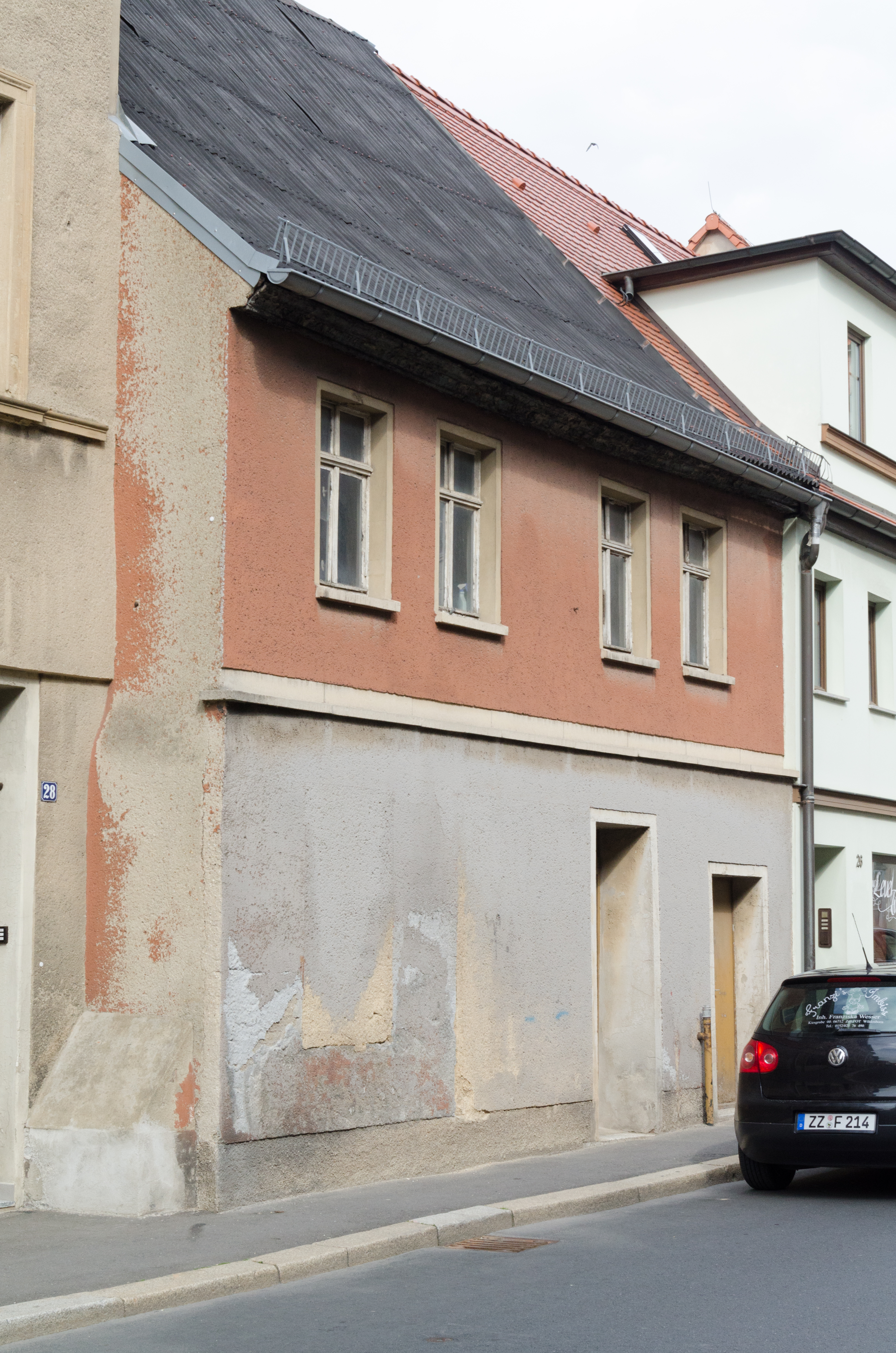 Zeitz, Kalkstraße 27